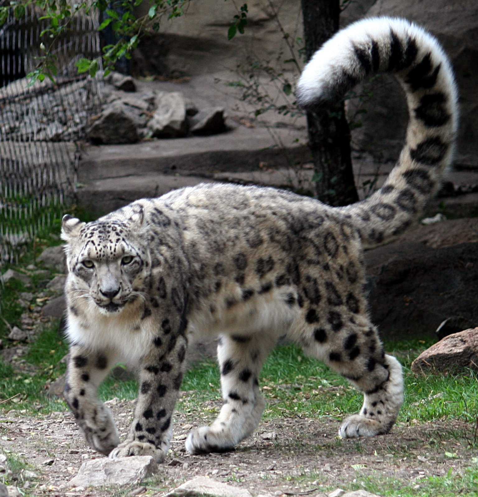 Panthère des neiges au zoo de Brookfield